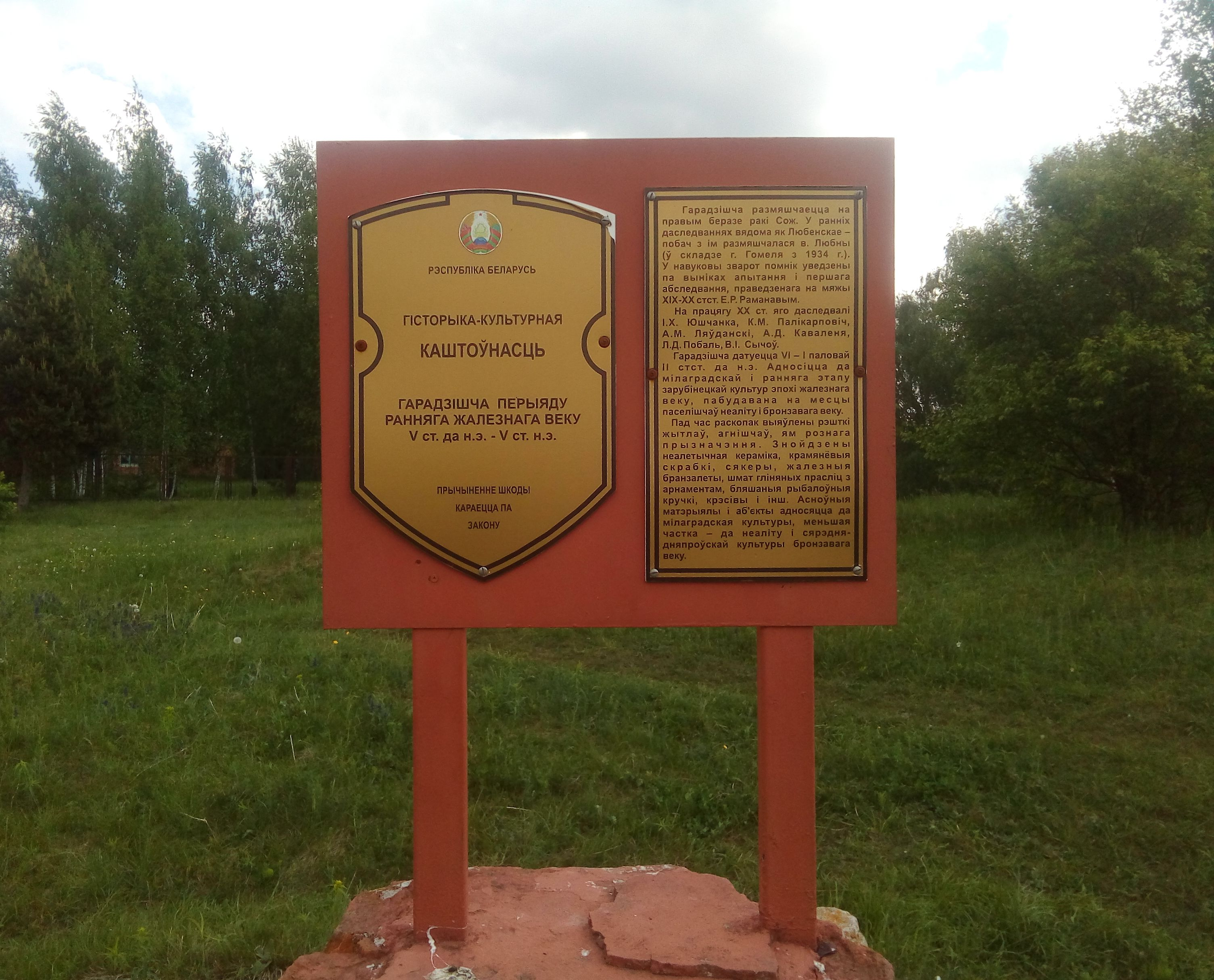 Гарадзішча "Шведская горка", ахоўны знак.